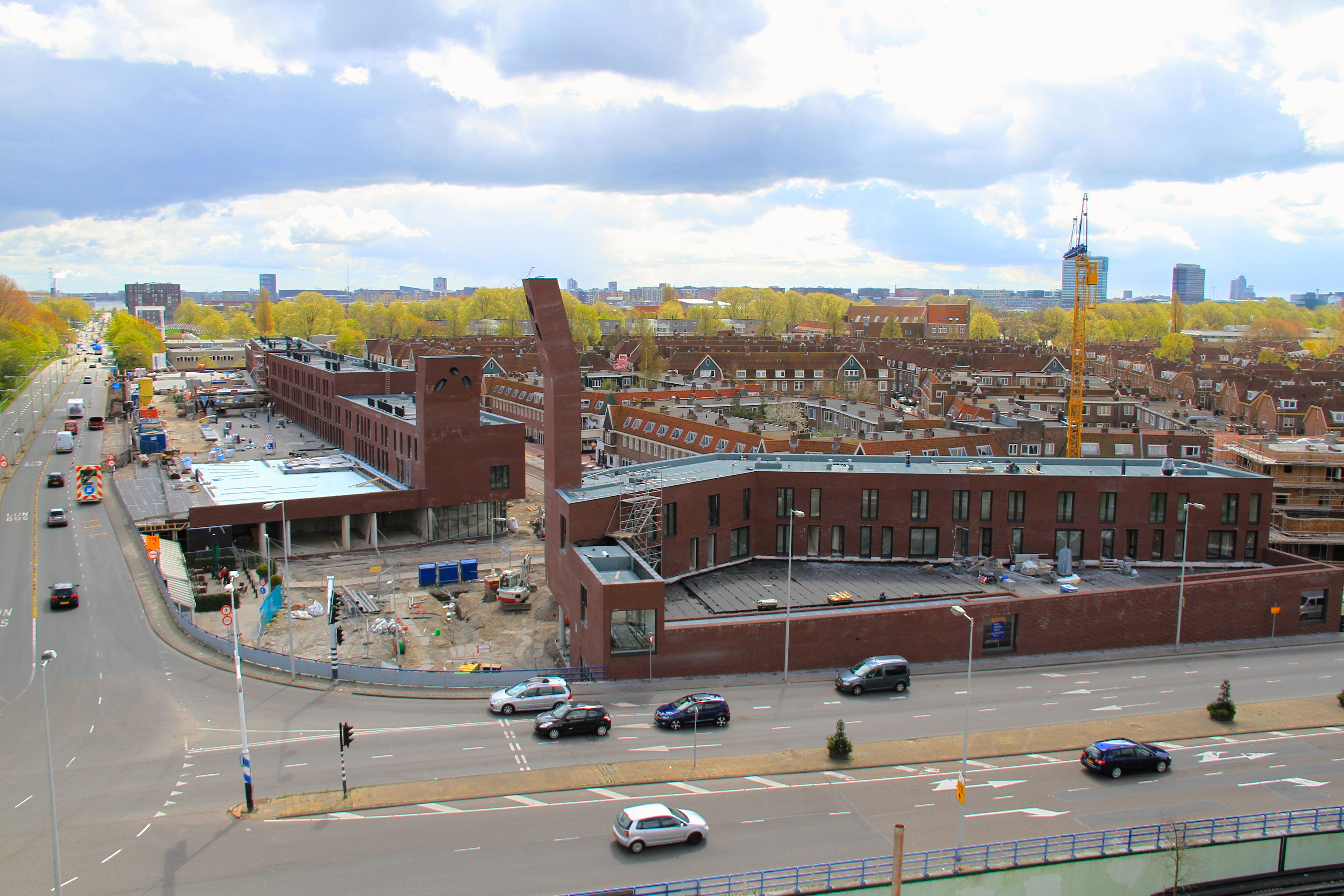 Mosplein, verbouwing, links de Johan van Hasseltweg (in oostelijke richting).